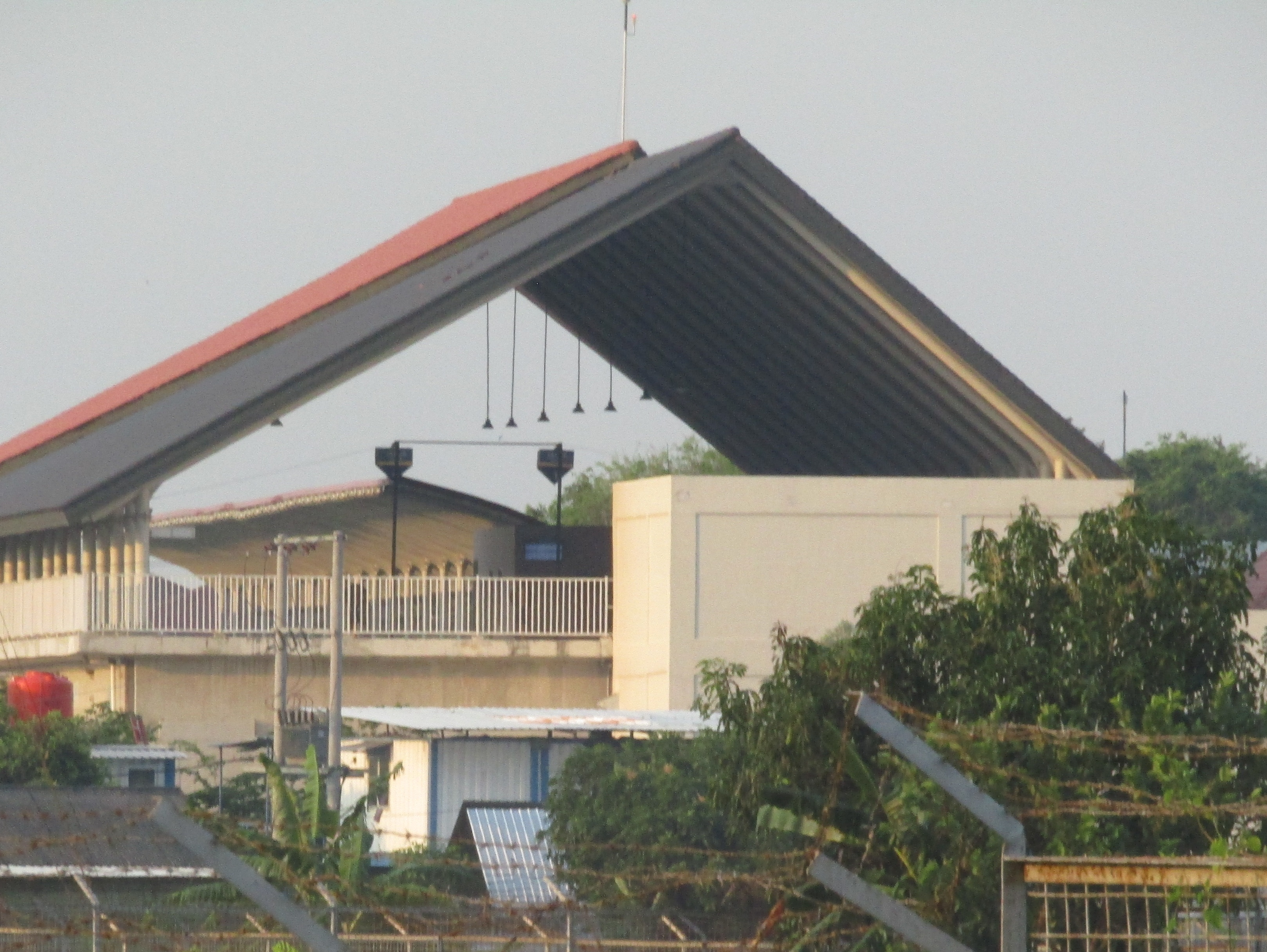 Tampak eksterior dari Stasiun Bandara Adisumarmo